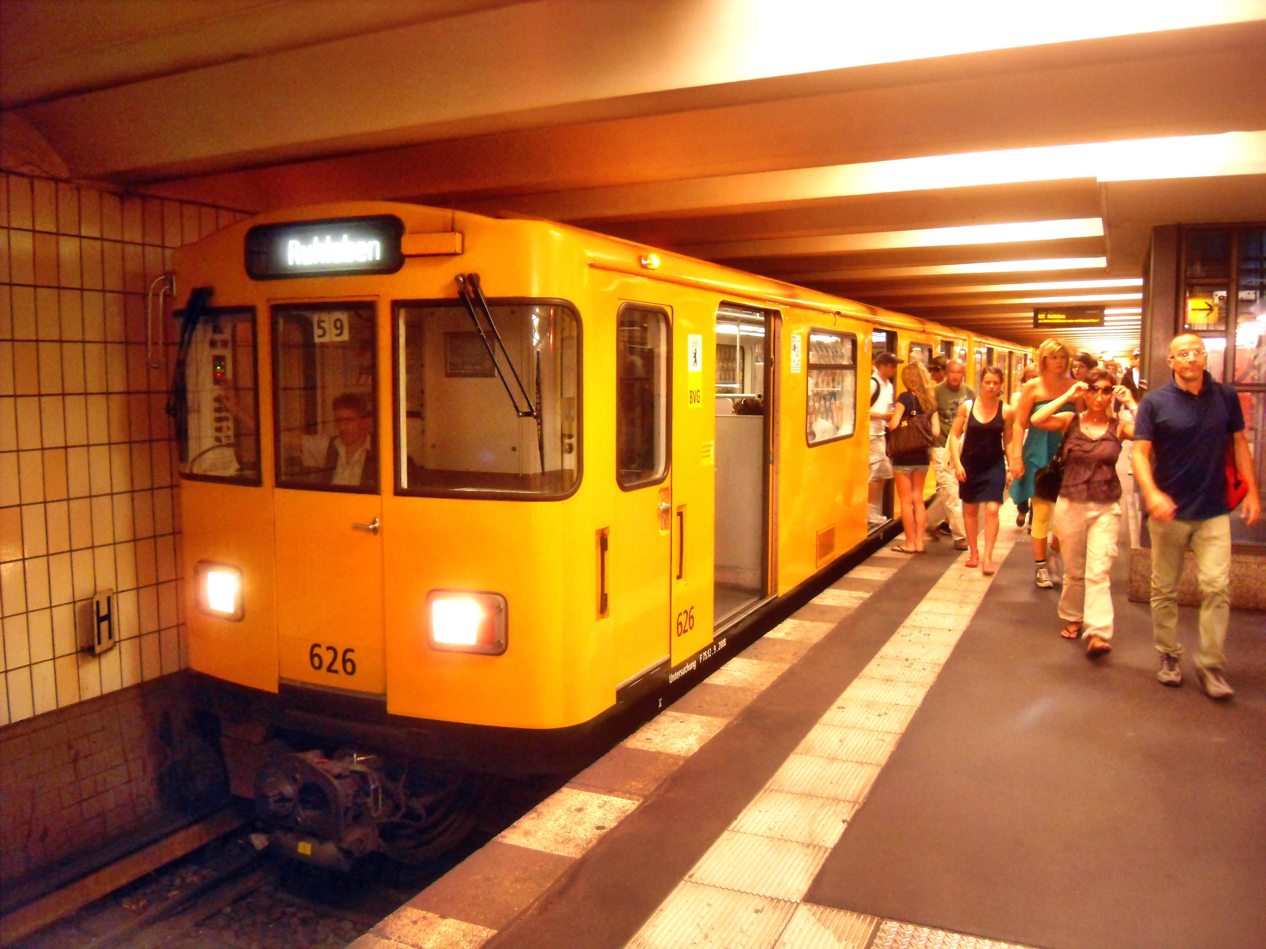 U-Bahn der BVG-Baureihe A3L 92 in der U-Bahn-Station Stadtmitte auf der Berliner U-Bahn-Linie U 2 auf dem Weg nach Berlin-Ruhleben in Deutschland